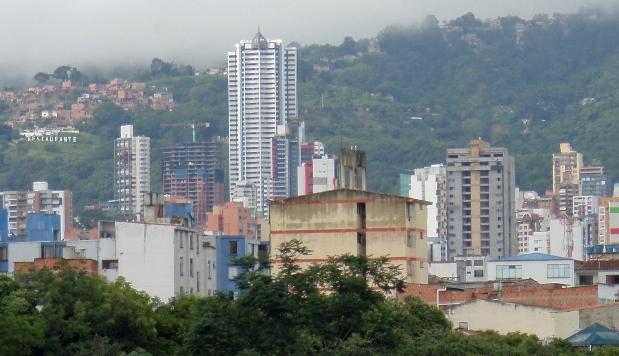 edificios